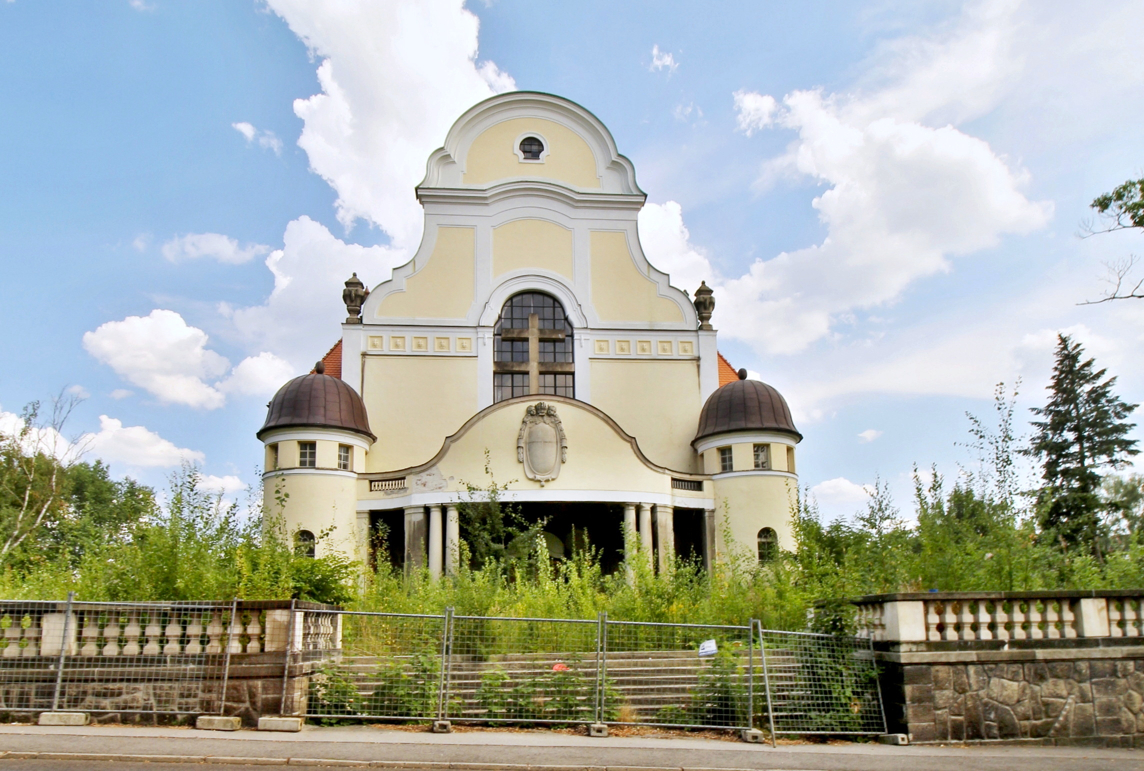 Kapucínský klášter a kostel sv. Máří Magdalény v Liberci